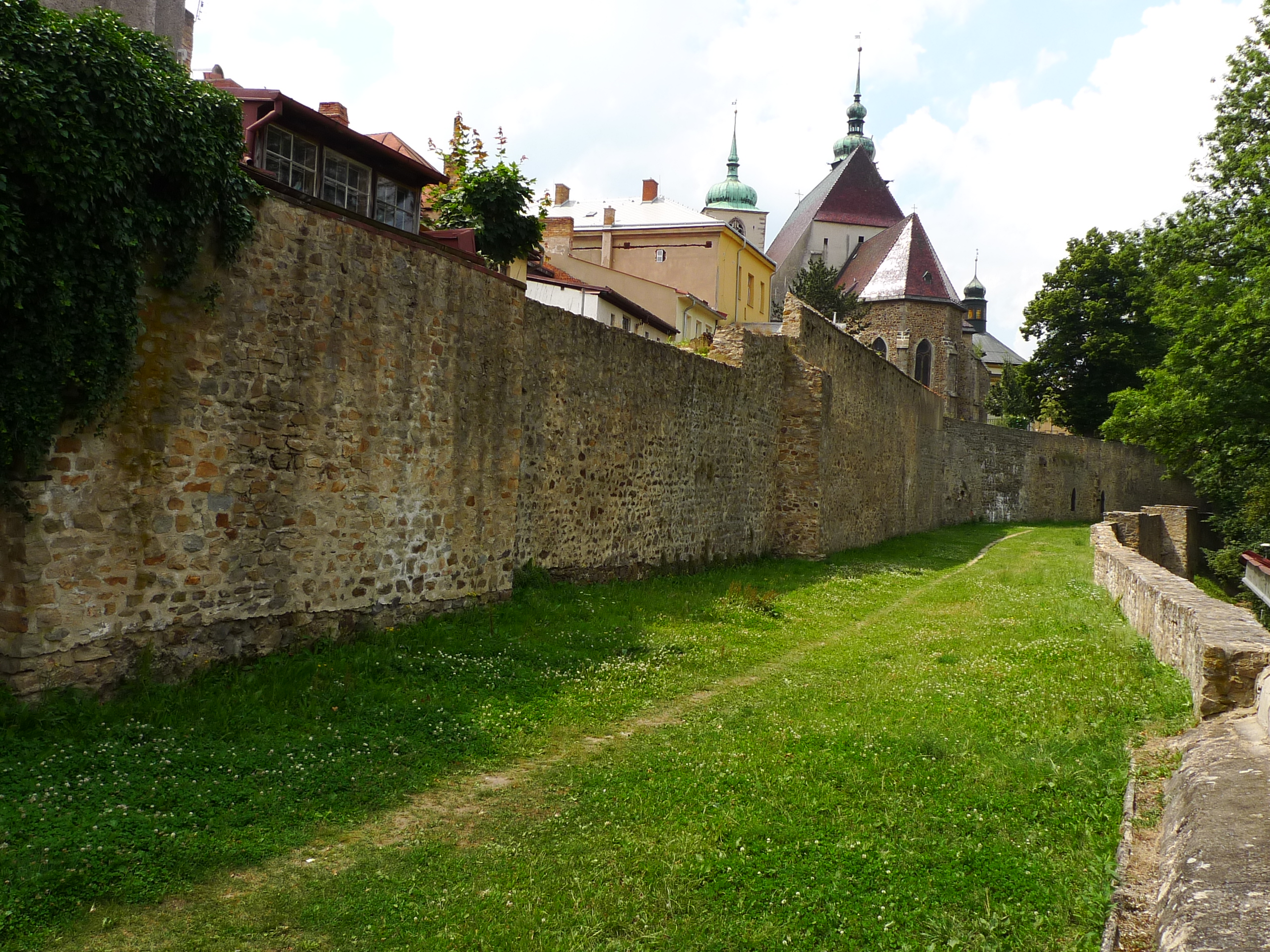 Městské opevnění (Jihlava), Jihlava